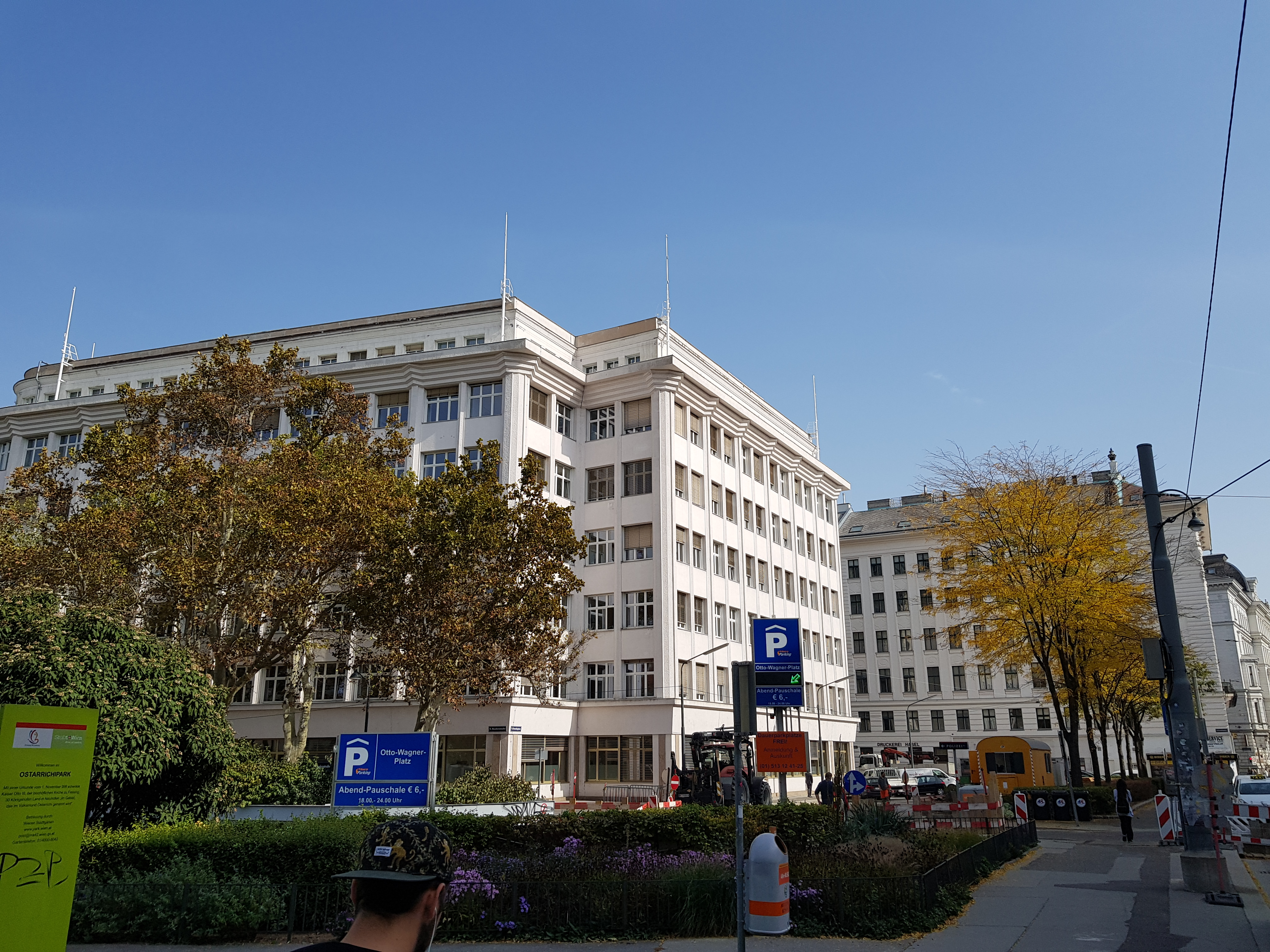 Frankhplatz, Wien Alsergrund